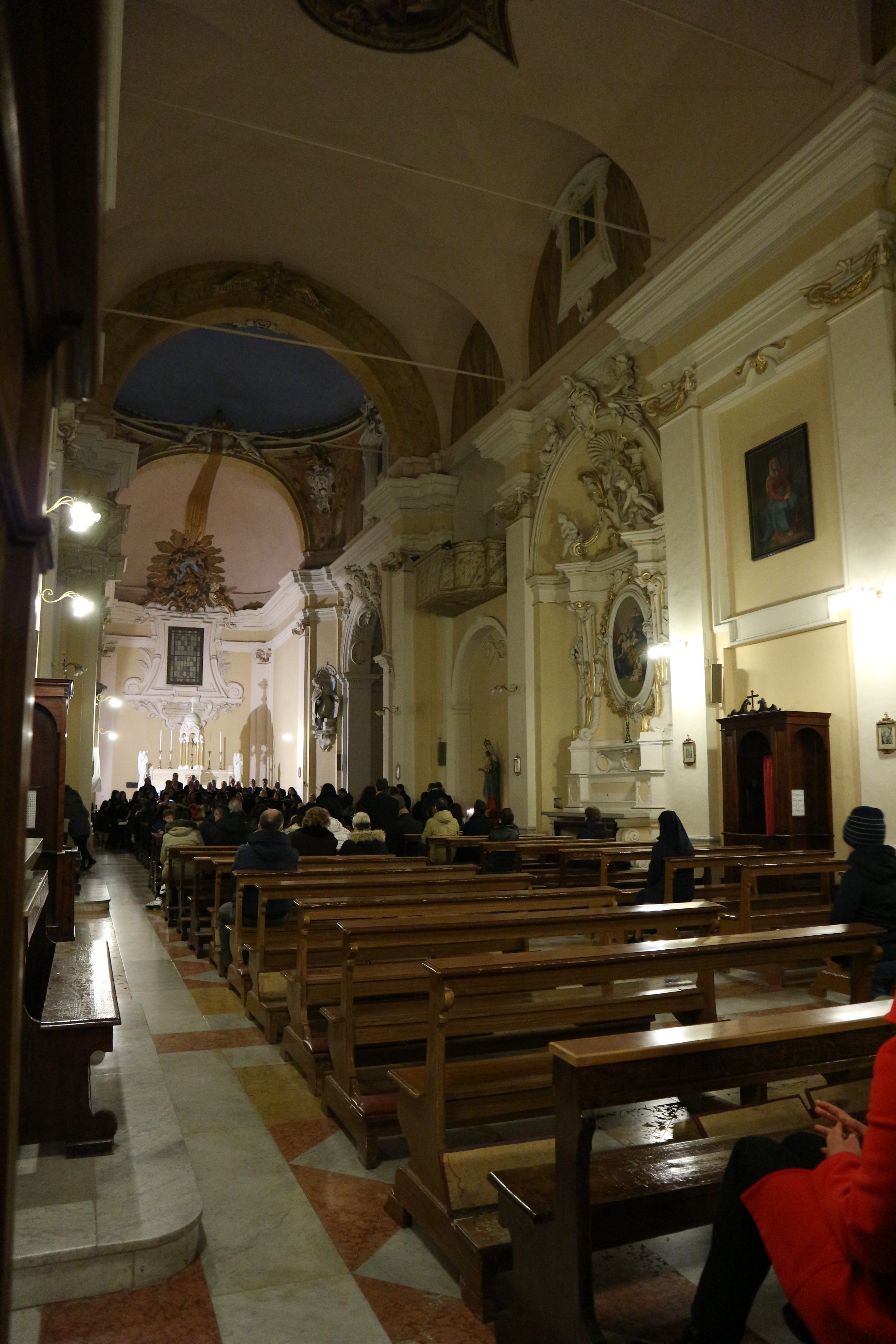 La chiesa di Santa Maria de Civitellis di Chieti